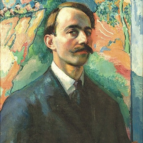 Бранко Поповић (1882-1944), аутопортрет из 1912. Извор